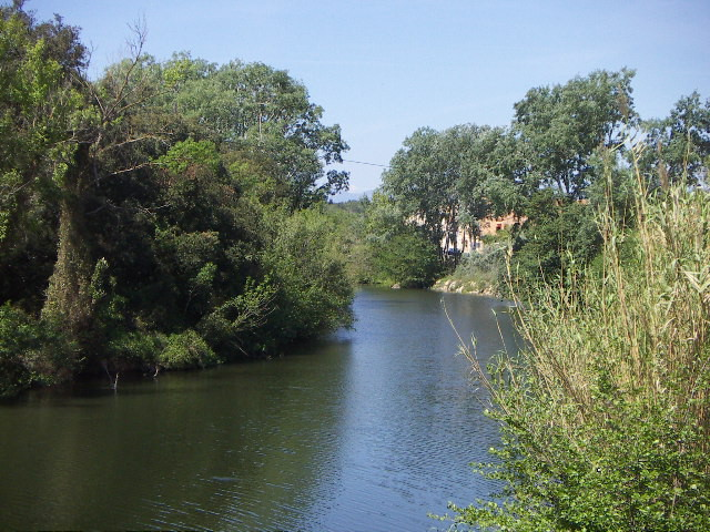 canyer a la resclosa de la Muga a Pont de Molins. Autor: jordi Coll Costa